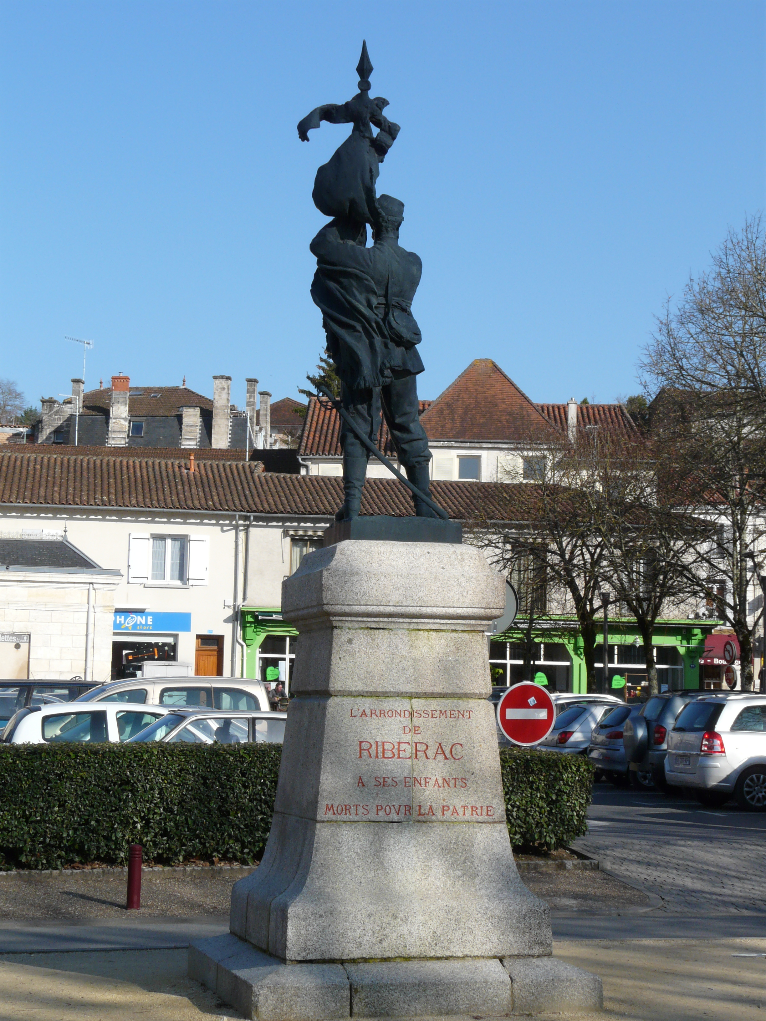 Monument à la mémoire du régiment des mobiles de Coulmiers (guerre de 1870) situé place du général de Gaulle, Ribérac, Dordogne, France.